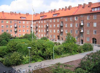 Kvaretert Öda, Malmö